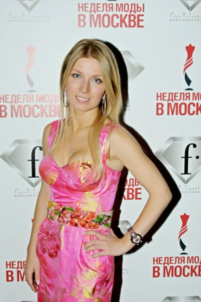 Неделя моды в Москве, 2009